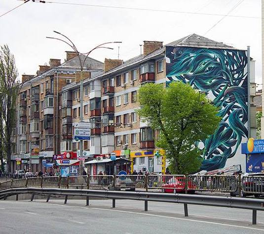 Мурал на Севастопольскій площі - Чоколівка